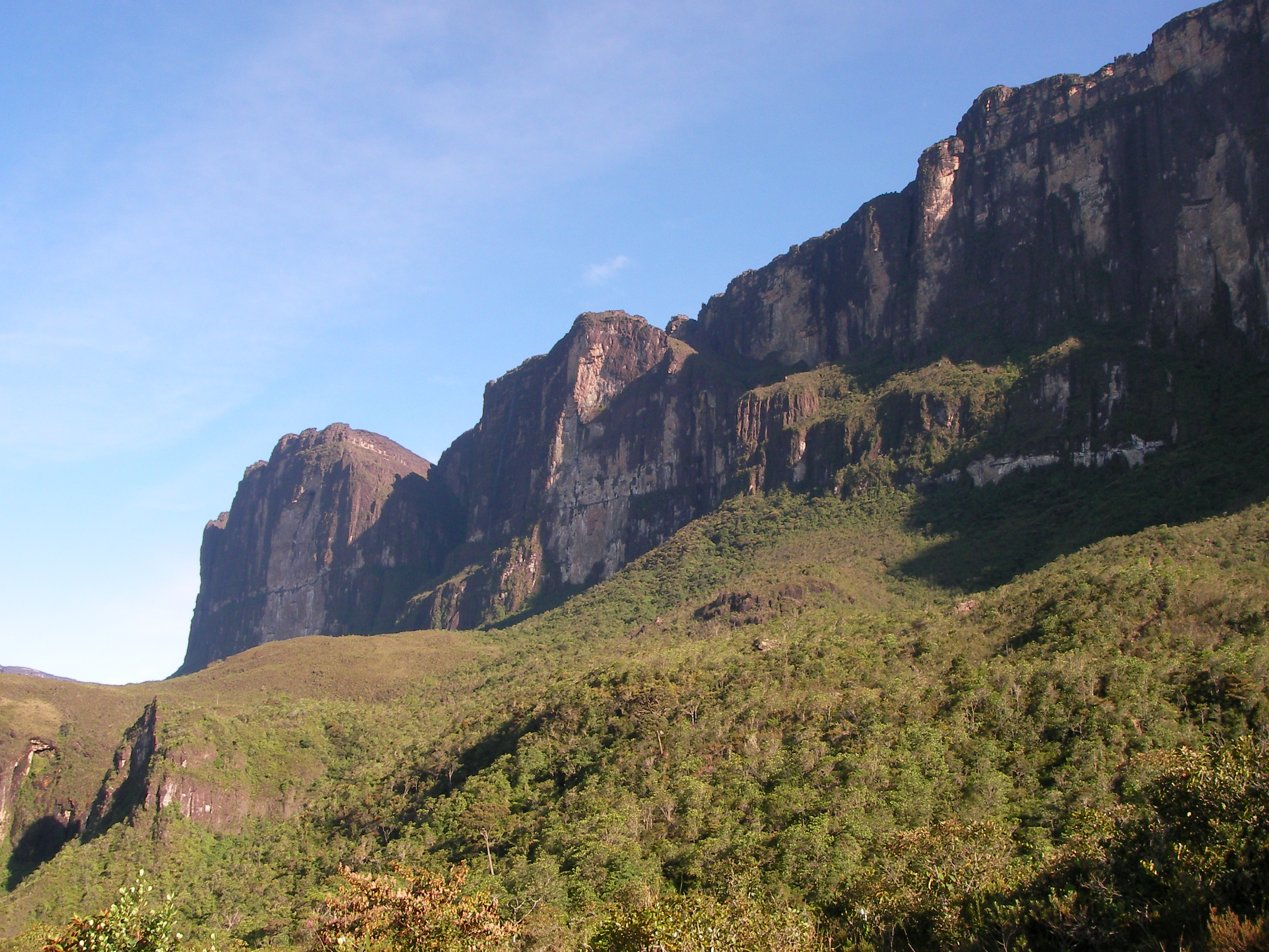 Foto tomada en excursión al Roraima en el Estado Bolívar en Venezuela